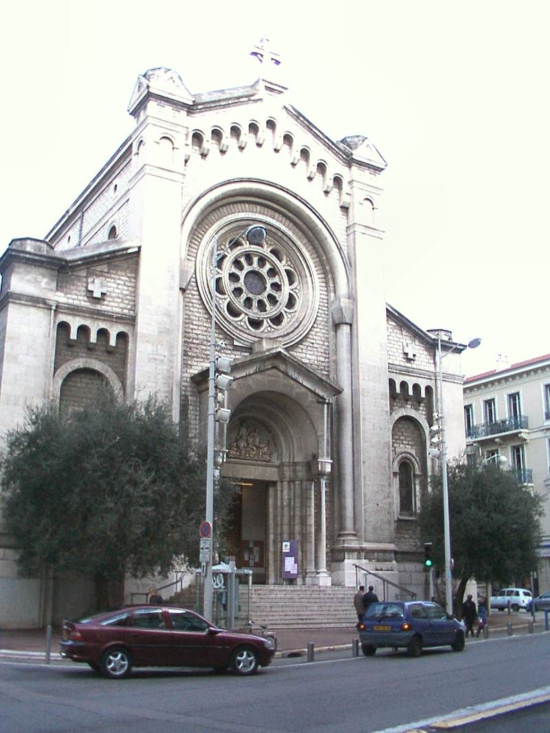 Nice-Musiciens Rue de France